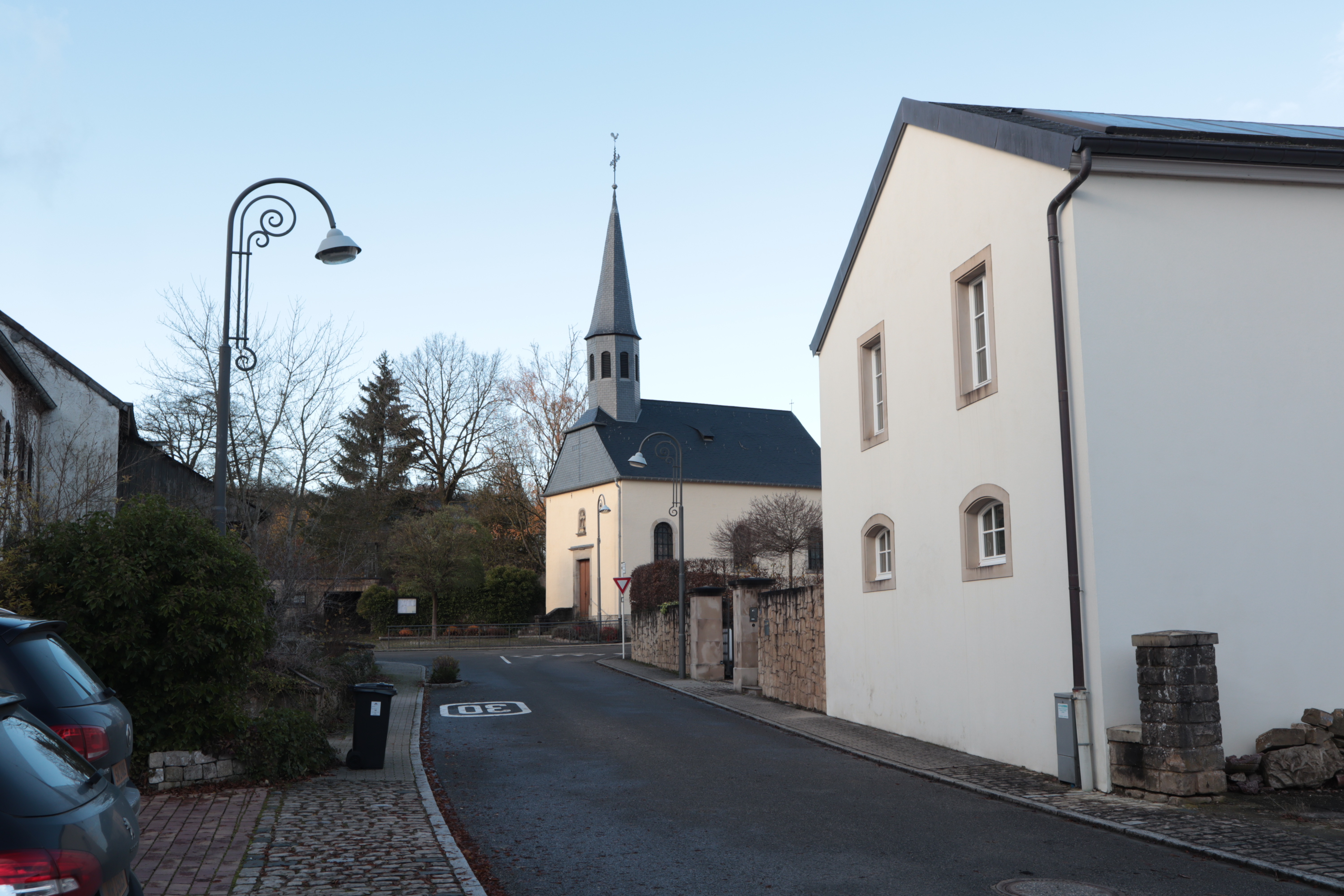 Josefskapelle in Schwebach, am 29. November 2019